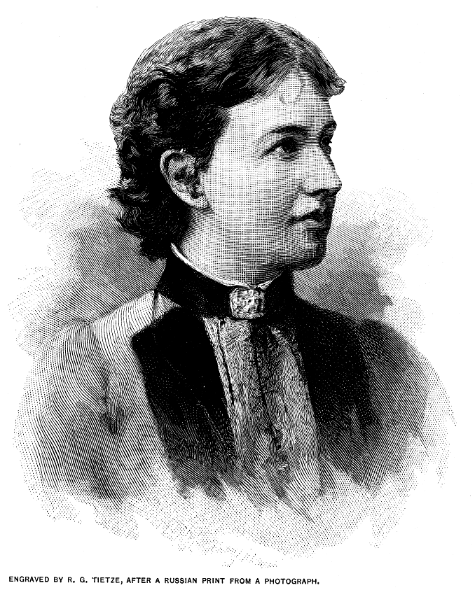 Sonya Kovalevsky